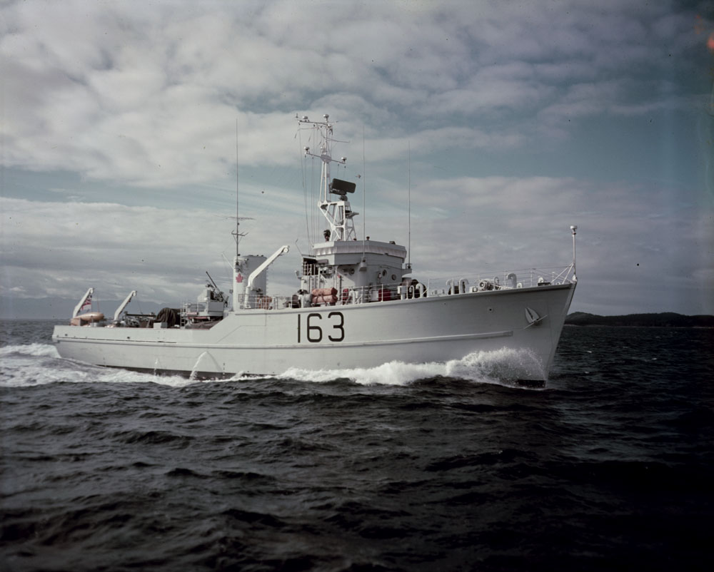 HMCS Miramichi (MCB 163)